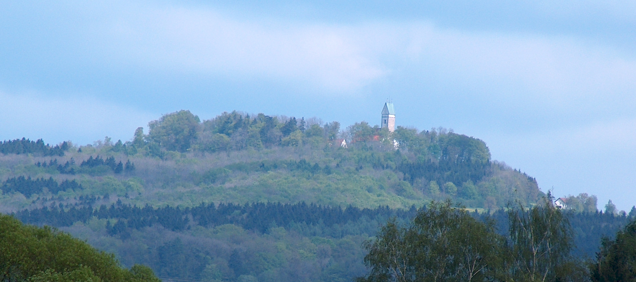 Summary Der Bussen, heiliger Berg Obeschwabens Fotoarchiv: Roland Nonnenmacher Fotograf: Roland Nonnenmacher 72516 Scheer Aufnahmedatum: 6.05.2005